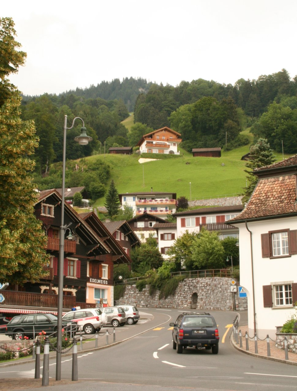 Edelweiß